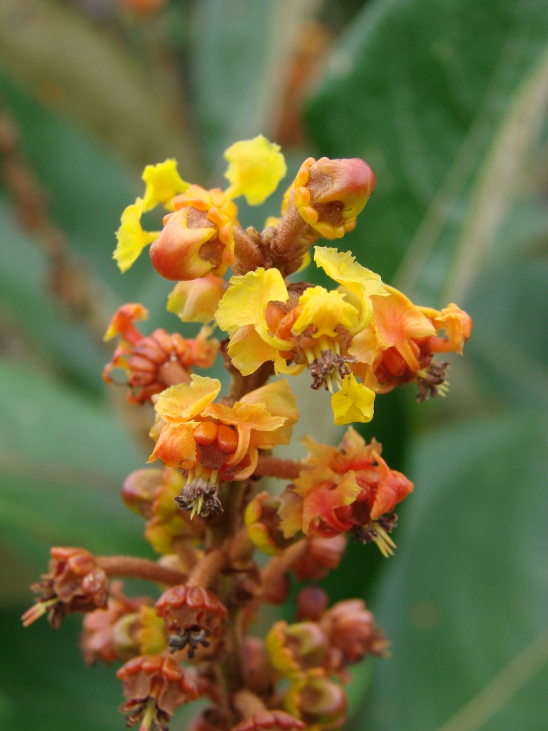 Byrsonima basiloba - MALPIGHIACEAE - Parque Olhos D'Água - Brasília - Distrito Federal - Brasil.